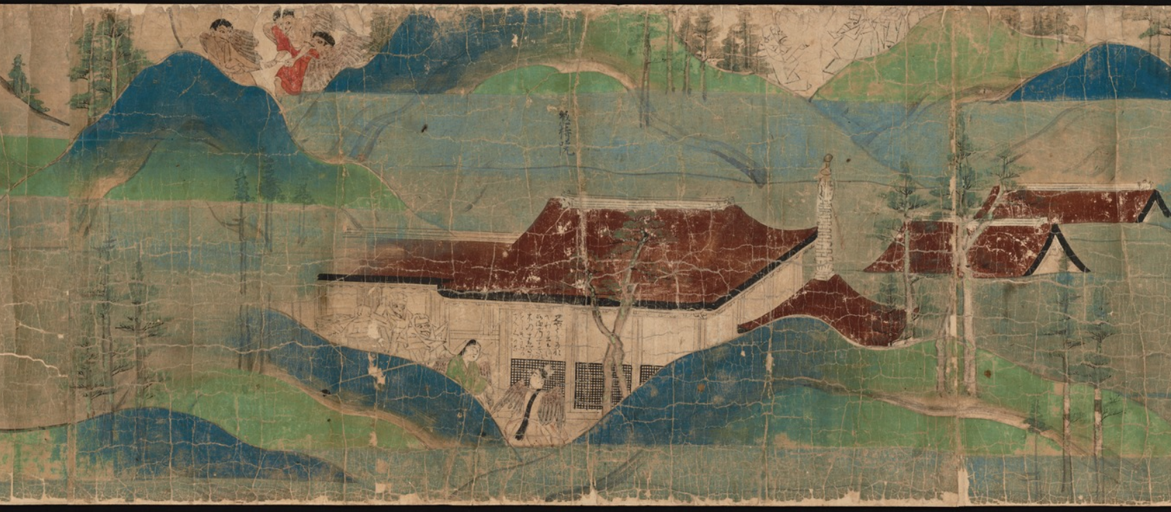 Tengu zoshi emaki. Détail du rouleau du Enryaku-ji.